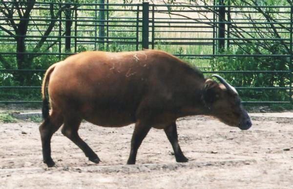 Tierpark Berlin - Rotbüffel (Syncerus caffer nanus)